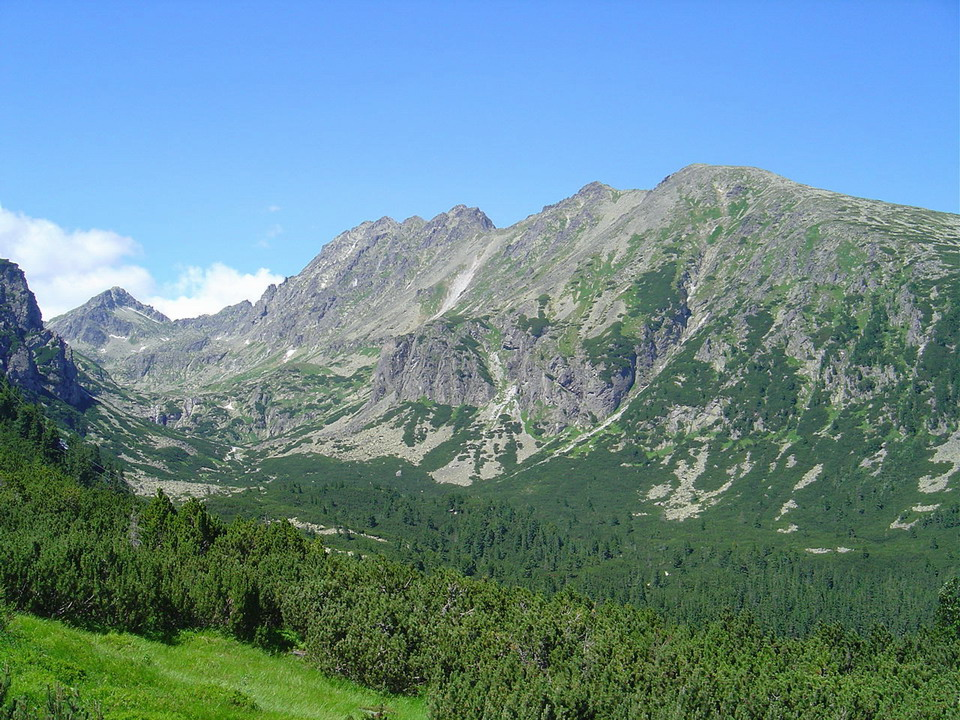 Strbsky stit (left) and Mlynicka dolina